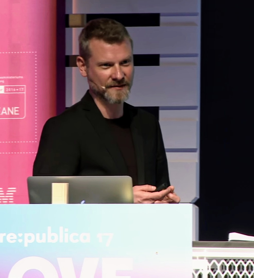 Complete Title: "Etwas Empirie: Was wir wirklich über Filterblasen, Fake-News und die digitale Öffentlichkeit wissen." Find out more at: Fake News, Filterblasen, Hate Speech, Social Bots: Starke Schlagworte zum Wandel der Öffentlichkeit in der digitalen Sphäre gibt es im Überfluss. Die Empirie kommt dabei bislang meist etwas zu kurz . Das ändern wir und geben einen Überblick zum Stand der Forschung: Was wissen wir aus wissenschaftlichen Studien wirklich über Öffentlichkeit und Diskurs in der digitalen Sphäre? Konrad Lischka Christian Stöcker Creative Commons Attribution-ShareAlike 3.0 Germany (CC BY-SA 3.0 DE)